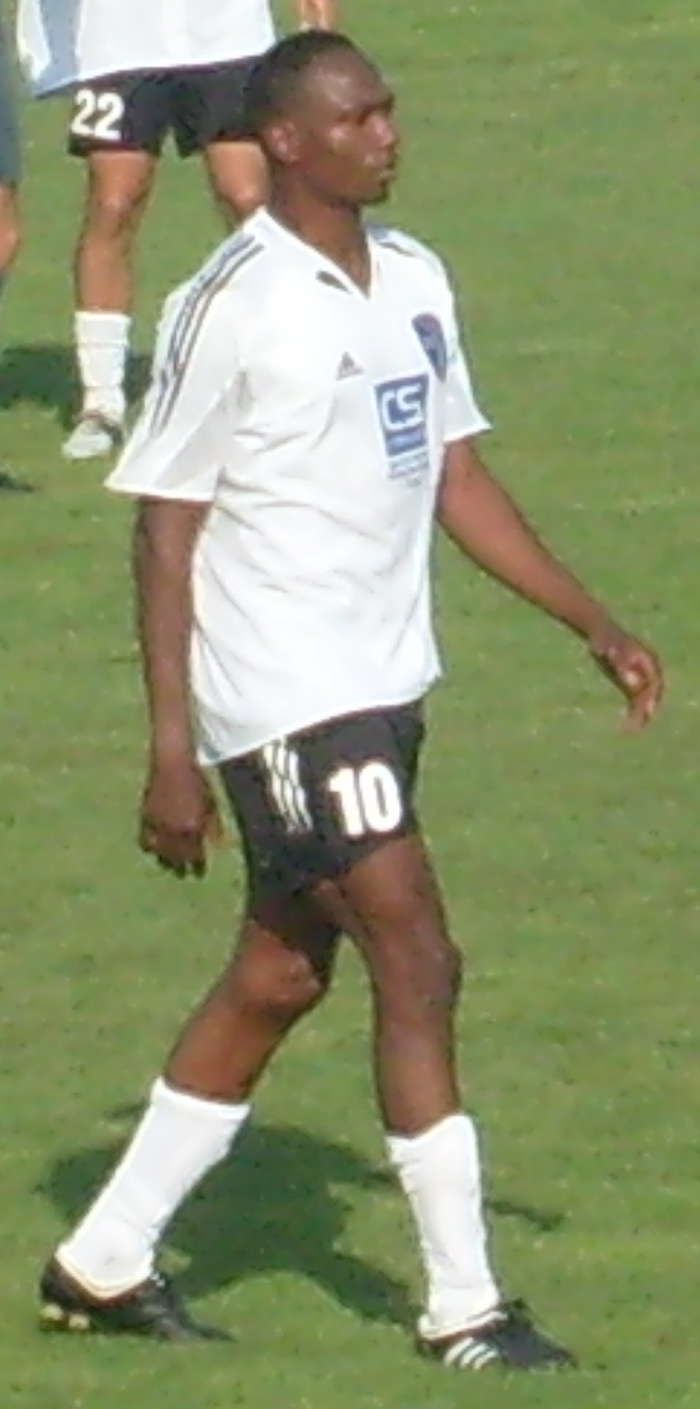 На товарищеском матче Таврия - Крымтеплица (2:1)